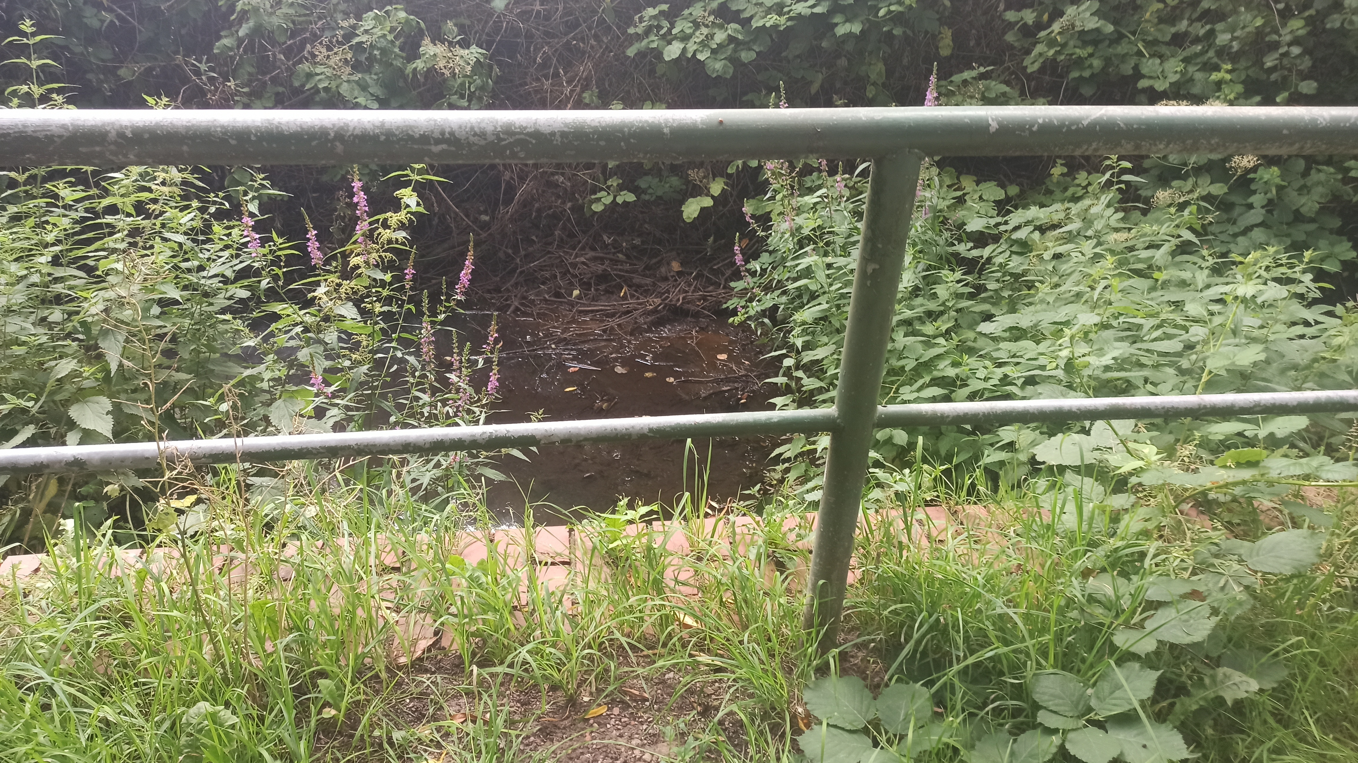 Mündung des Vielohgrabens in die Kollau